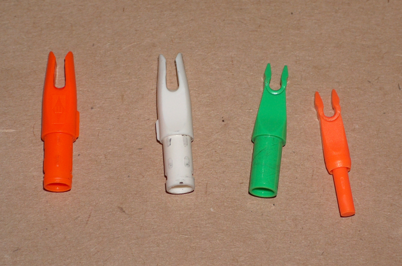 Nasadki do strzał